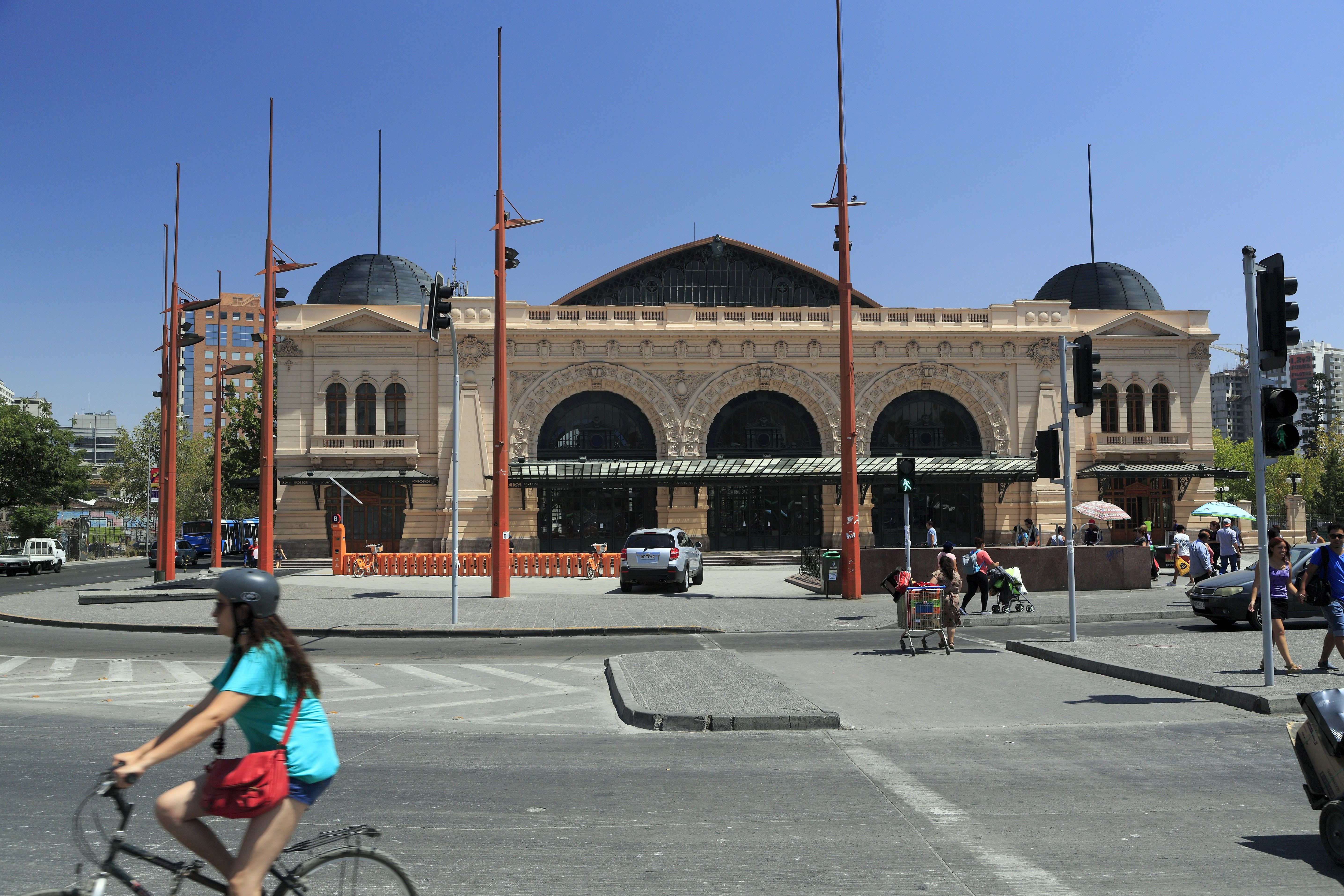 Von der Avenida Independencia, der Bahnhof wurde insbesondere von den Zügen in Richtung Valparaíso genutzt und nach 1990, möglicherweise in Verbindung mit der Einstellung des Reiseverkehrs auf dieser Strecke, geschlossen und nach Abbau der Bahnanlagen zum Kulturzentrum umgewandelt.